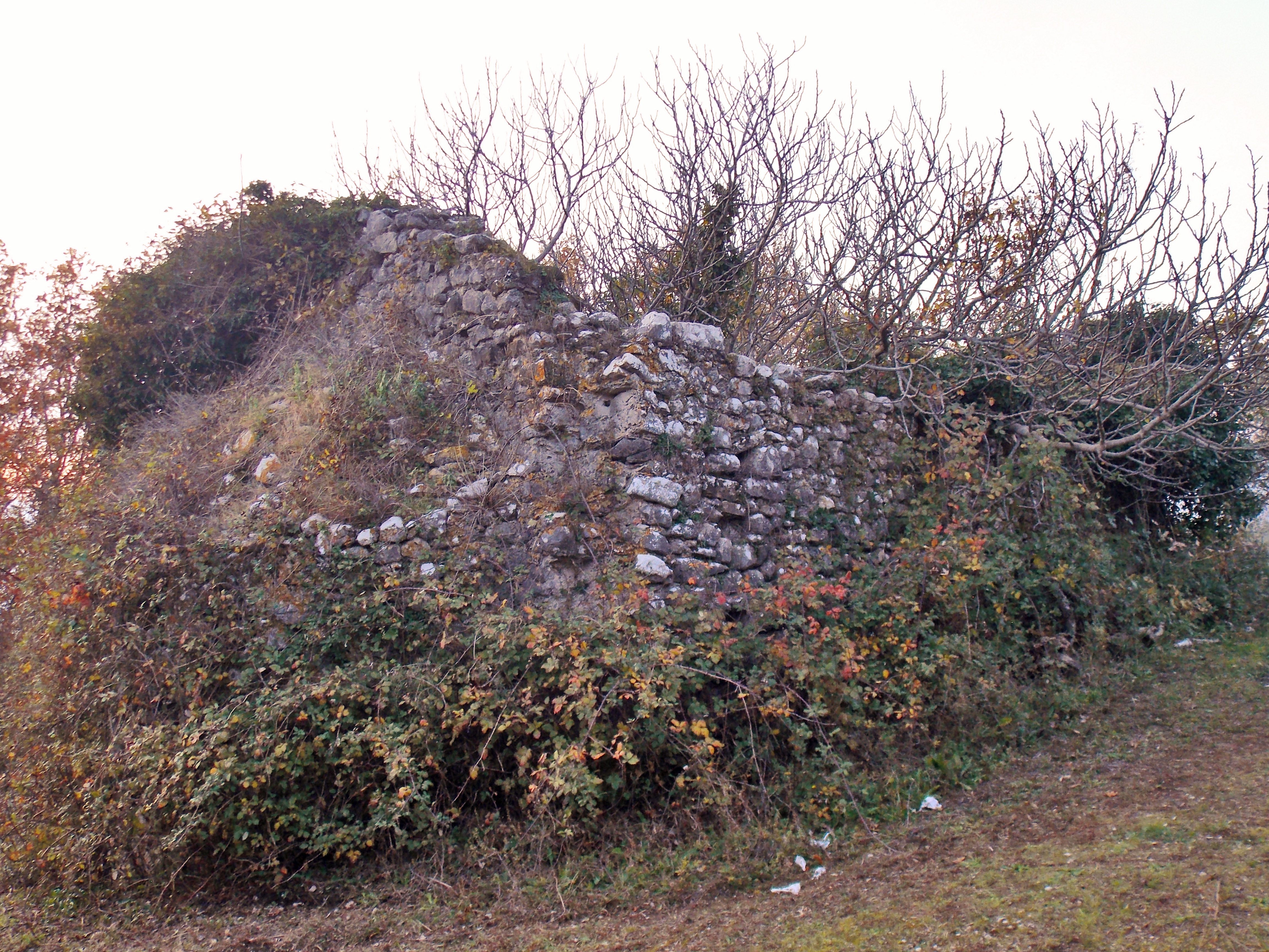 I ruderi della chiesa di San Lorenzo, nel territorio comunale di Faicchio (BN)